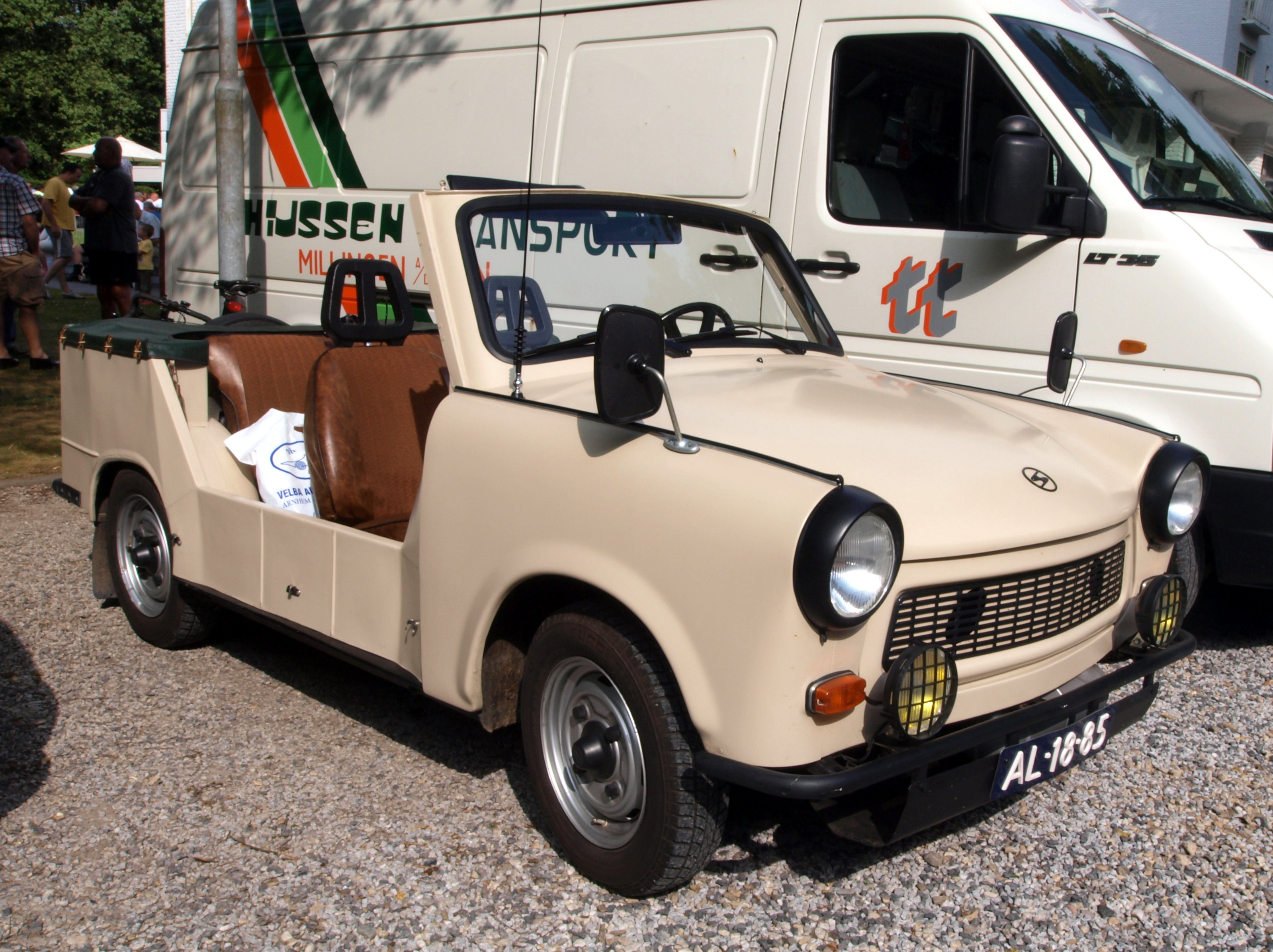 1971 Trabant P601